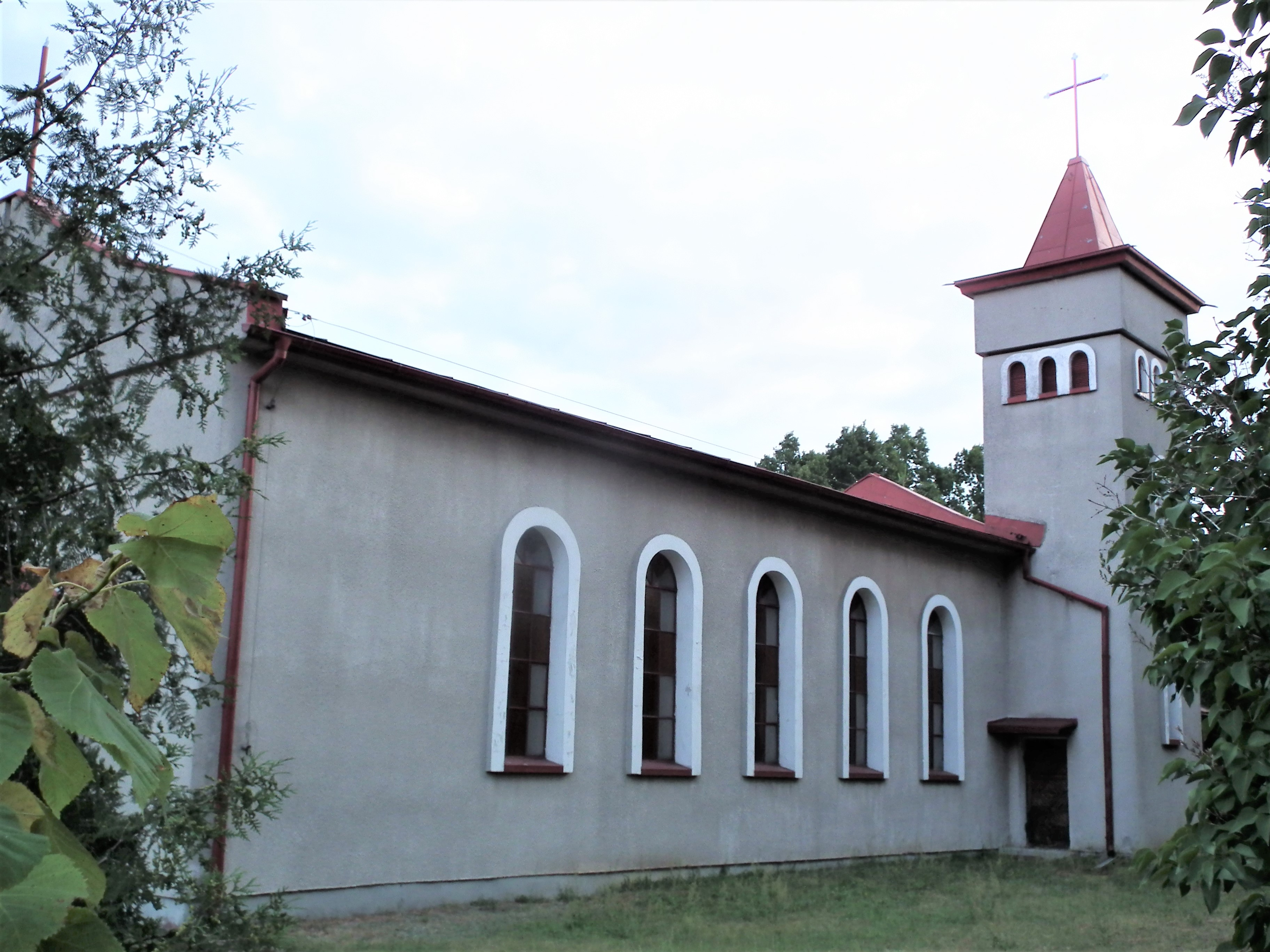 Kościół Narodzenia Najświętszej Maryi Panny w Karsiborze – nieczynny kościół zlokalizowany w północno-wschodniej części wsi Karsibór (powiat wałecki, województwo zachodniopomorskie). 12 sierpnia 1961 został wpisany do rejestru zabytków pod numerem 344 (obecnie jest to numer 757).